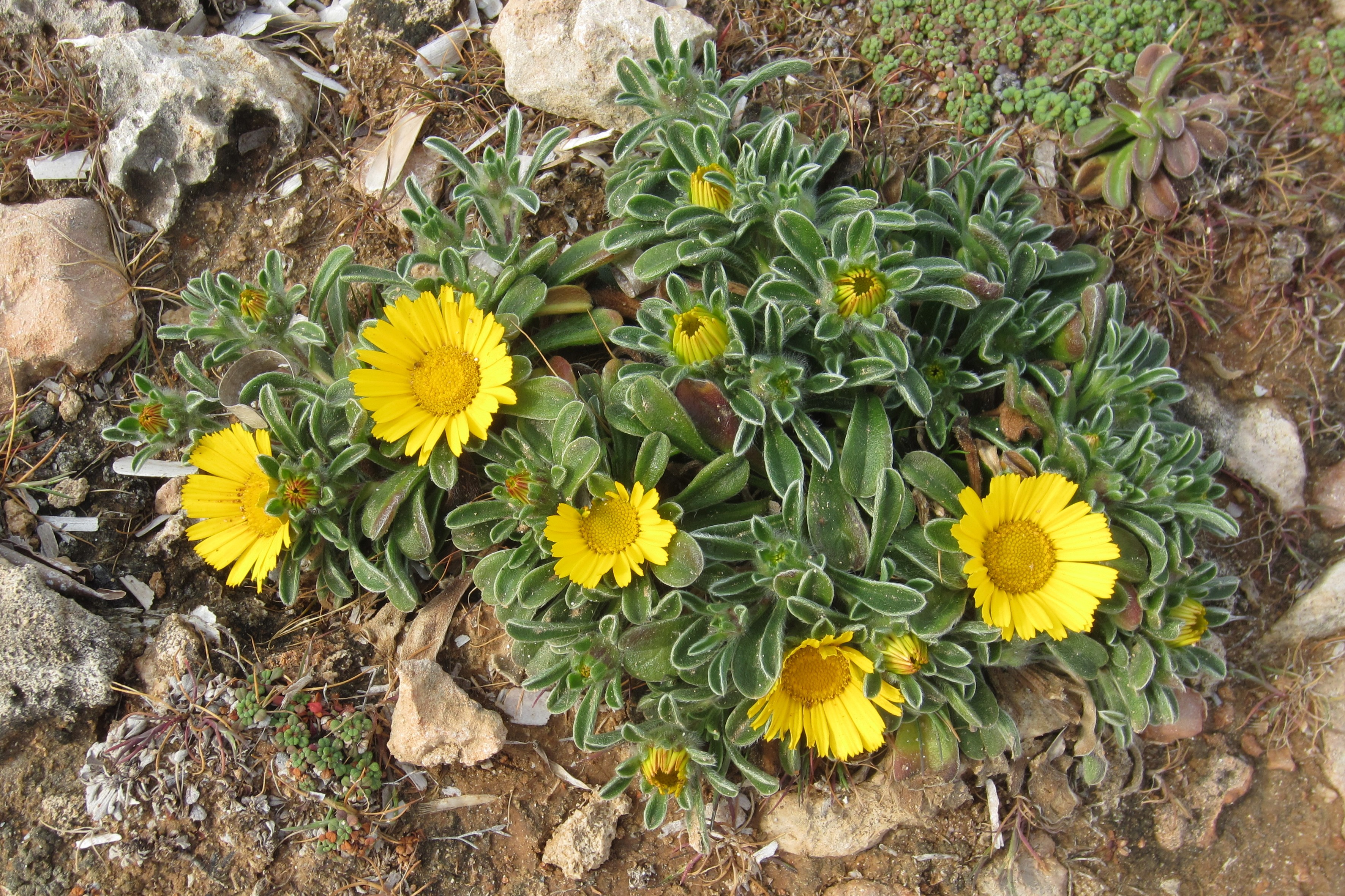 unbekannte Pflanze auf Mallorca